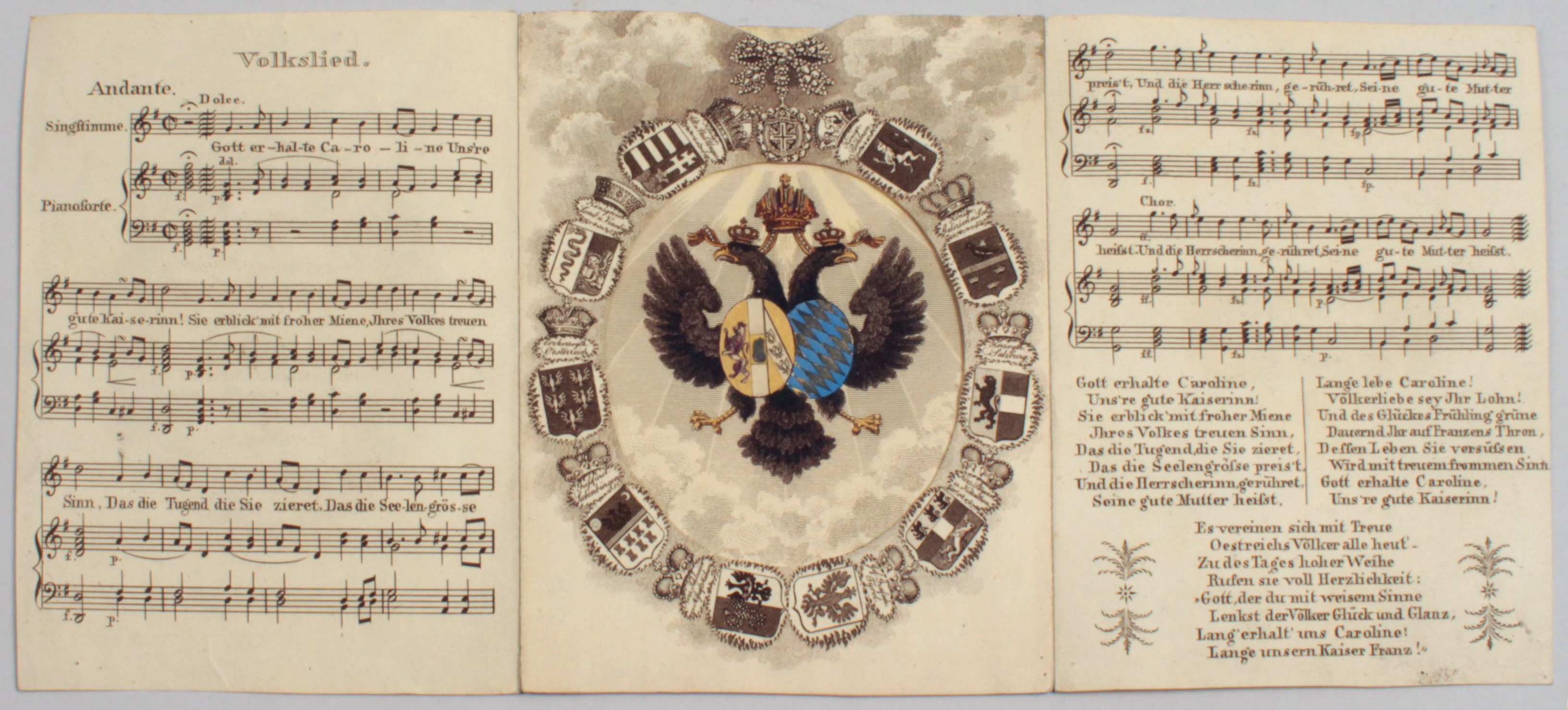 Das Bildniss Ihrer Majestät der Kaiserinn und Königinn Caroline in einer allegorischen Umgebung von Jos. Axmann; Nebst dem Volksliede: Gott erhalte Caroline! mit Begleitung des Pianoforte von Jos. Haydn. Zugkarte. Kolor. Kupferstich. Mit je einem aufklappbarem Blatt mit Musiknoten im Seitenrand. Wien, Axmann, Wieden, Paniglgasse No. 46 (ca. 1816). 13,3 x 10,2 cm (Gesamtgröße aufgeklappt 13,3 x 30,3 cm). Das von den Wappen der Kronländer umrahmte Portrait verbirgt sich hinter einem herausziehbarem Blatt mit dem Doppeladler.